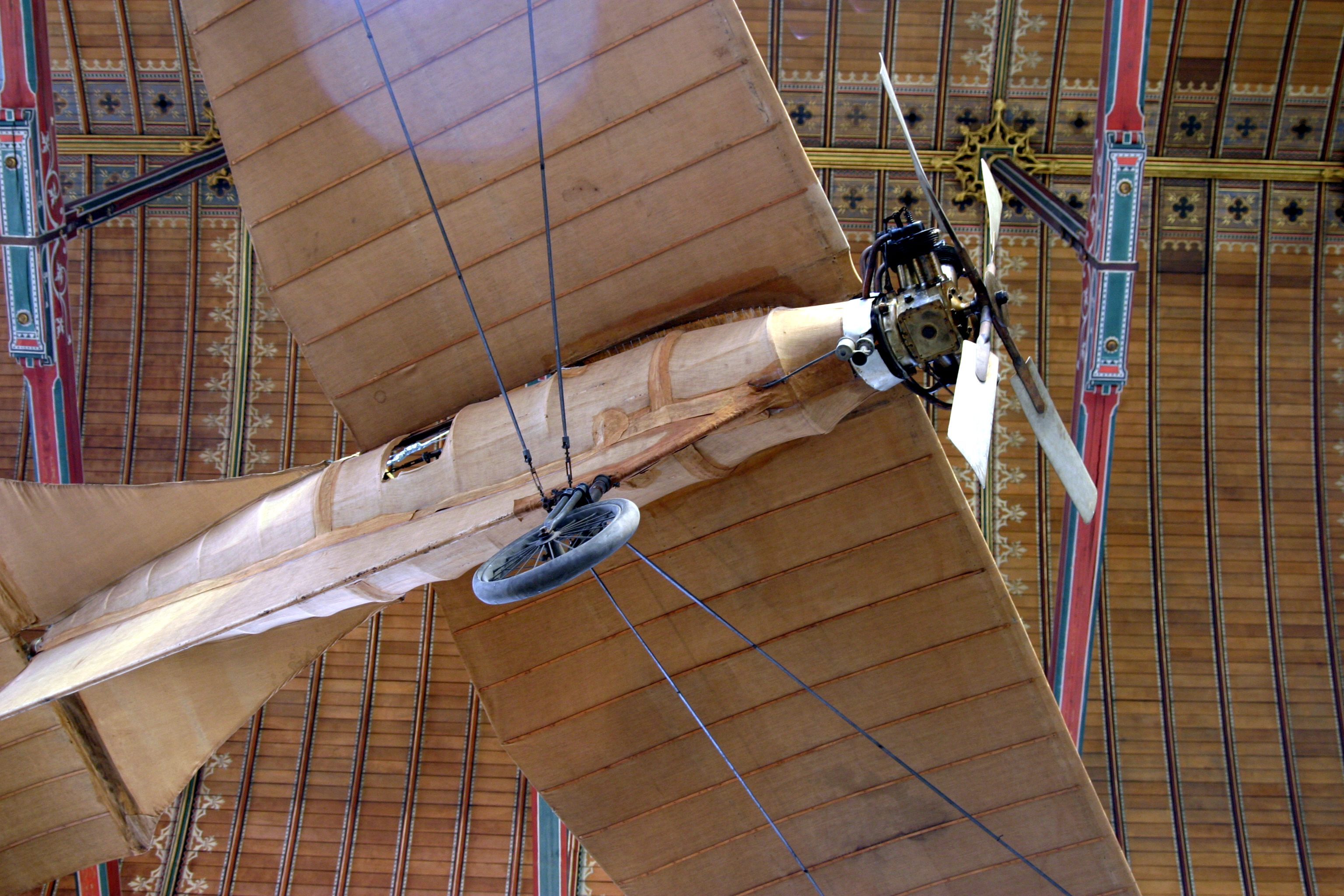 Avion Esnault-Pelterie , REP 1, 1906 Musée national des Arts et Métiers